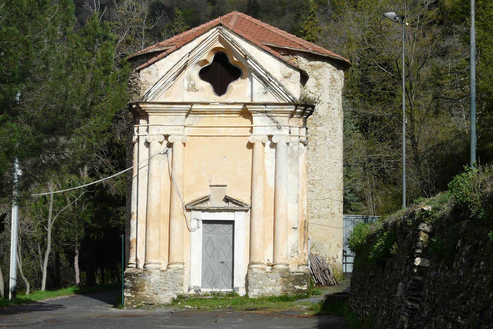 Santuario dei S.S. Cosma e Damiano, Stellanello, Liguria, Italia